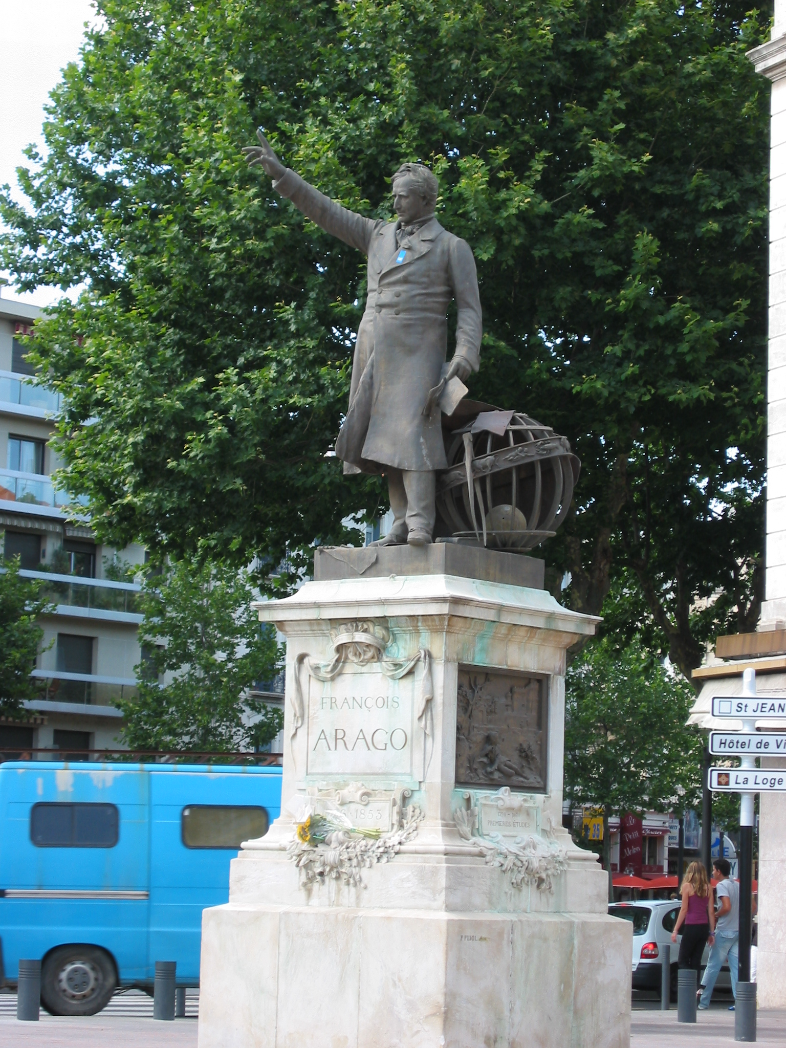 zelf gemaakt